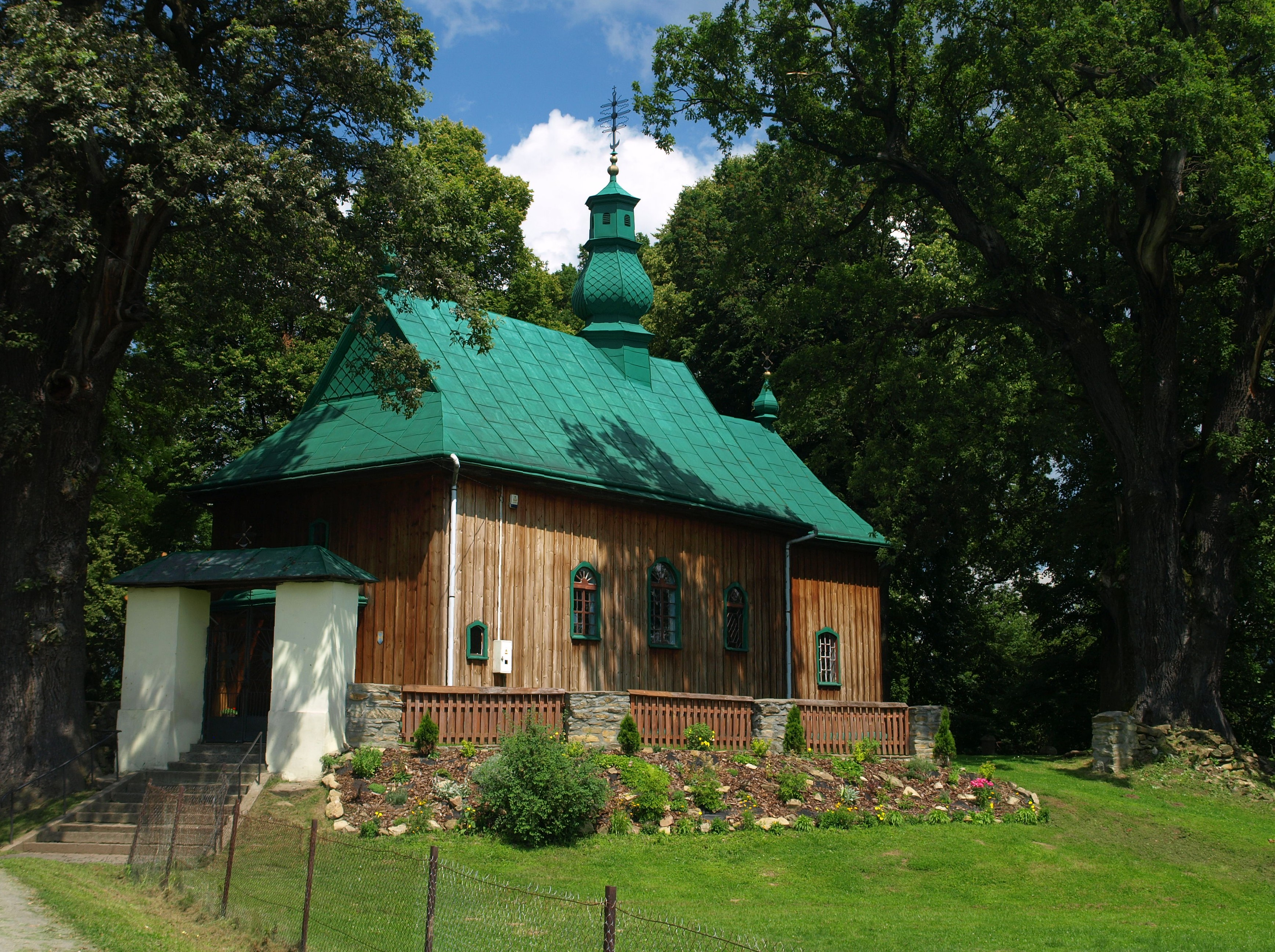 cerkiew gr.-kat. p.w. NMP, ob. prawosławna w Hłomczy (woj.podkarpackie).